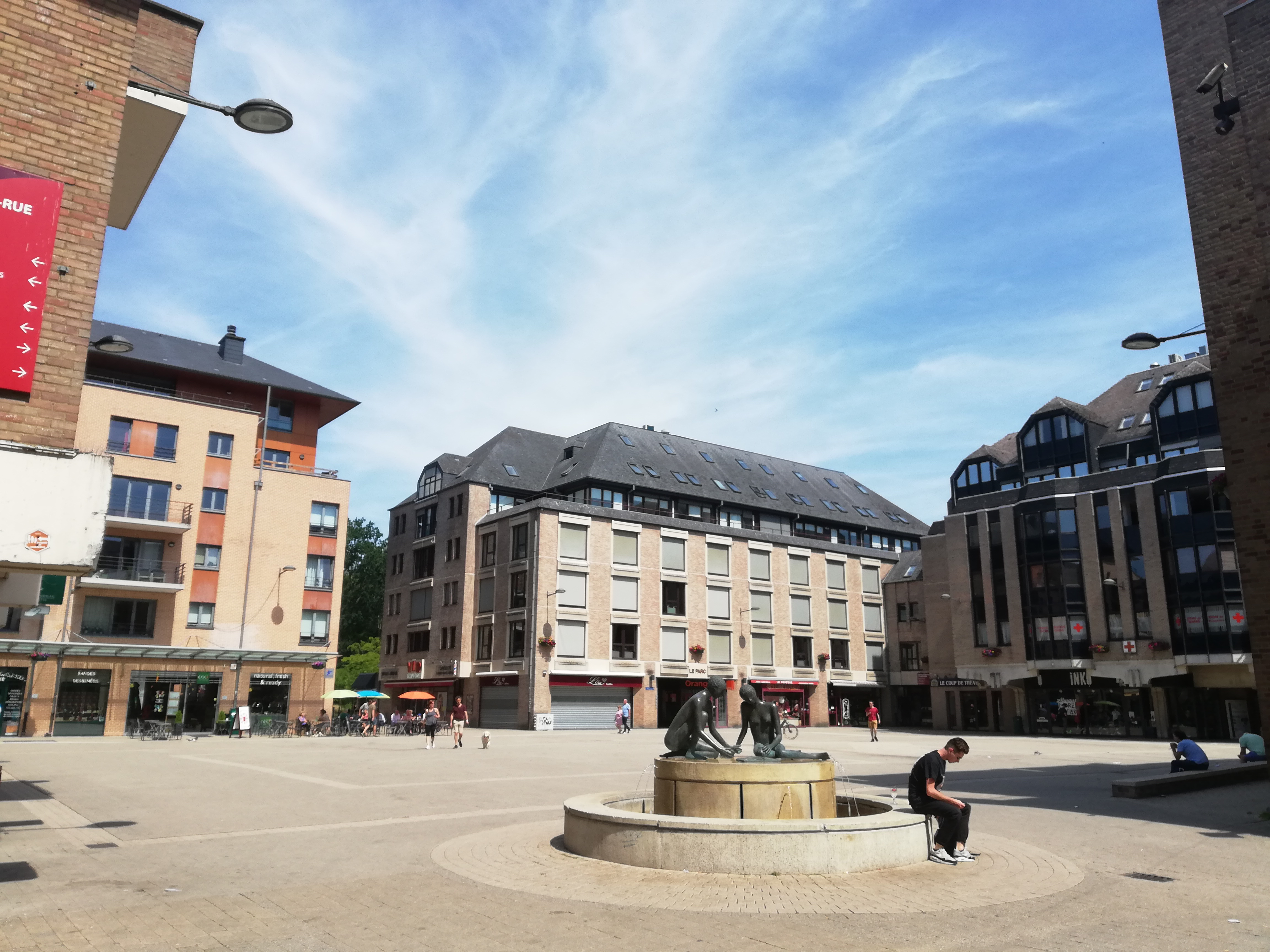 Place de l'Université